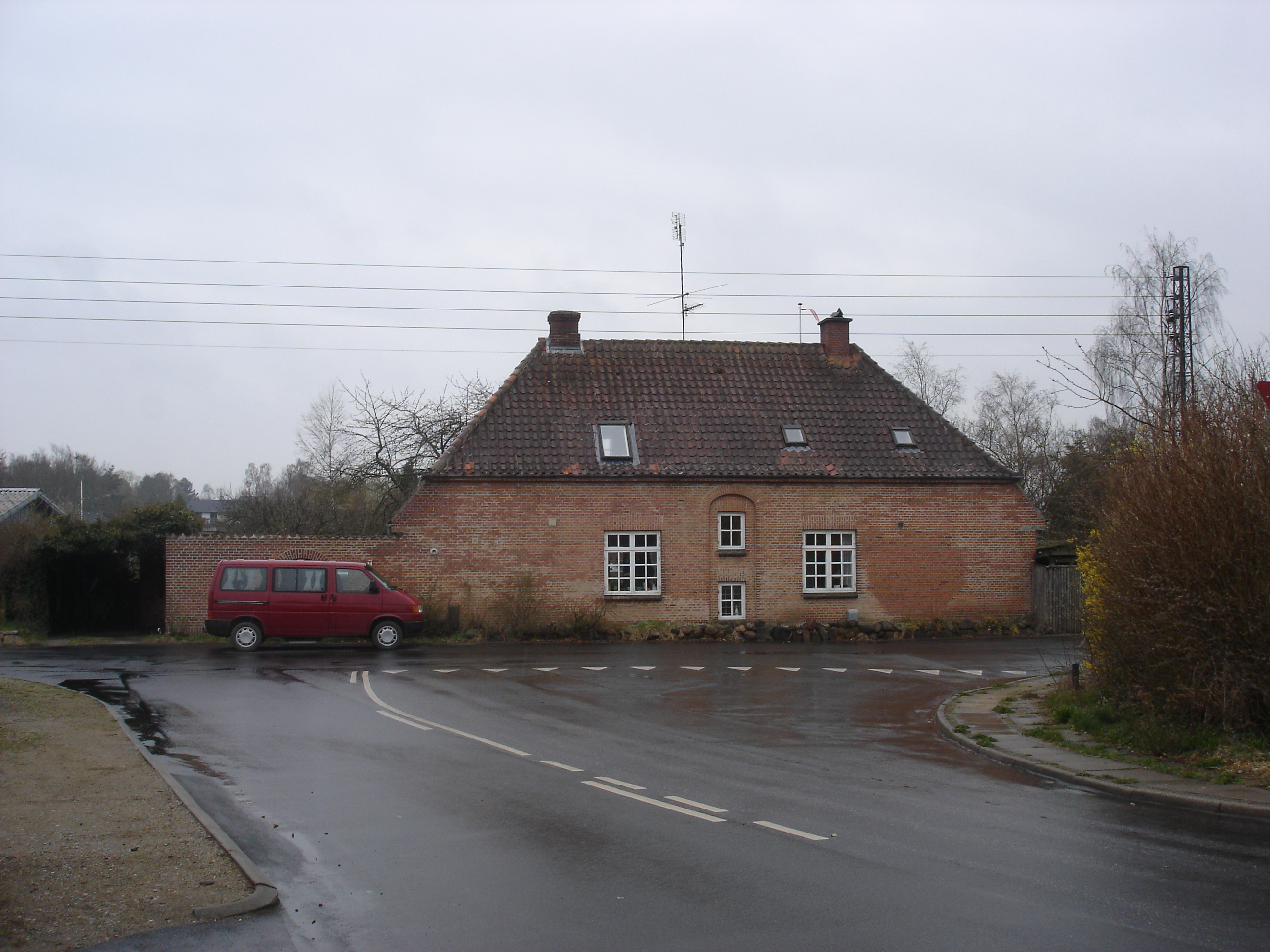 Ollerup Station fra vejsiden